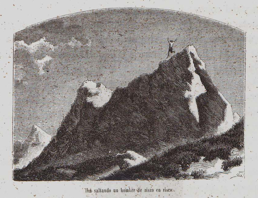 Iba saltando un hombre de risco en risco.